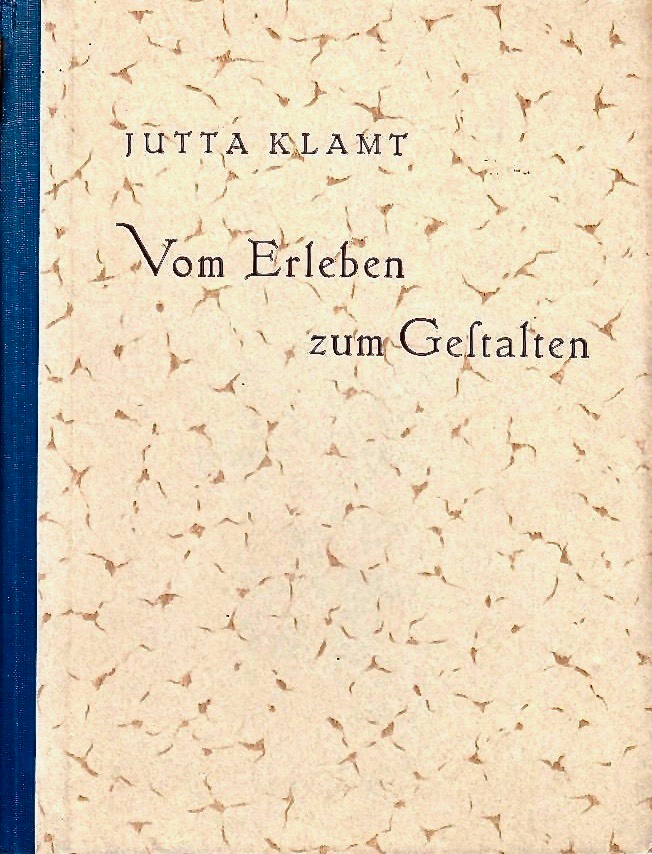 Jutta Klamt, Gustav Joachim Vischer-Klamt: Vom Erleben zum Gestalten. Die Entfaltung schöpferischer Kräfte im deutschen Menschen, Verlag Dr. Karl Höhn, Ulm [1936], 124 S., 24 Bl. Abb. Template:OCLC 916948419